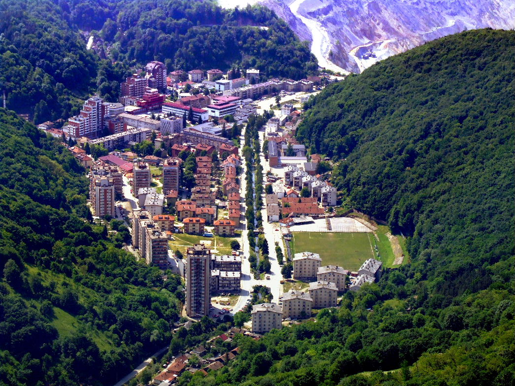 Majdanpek